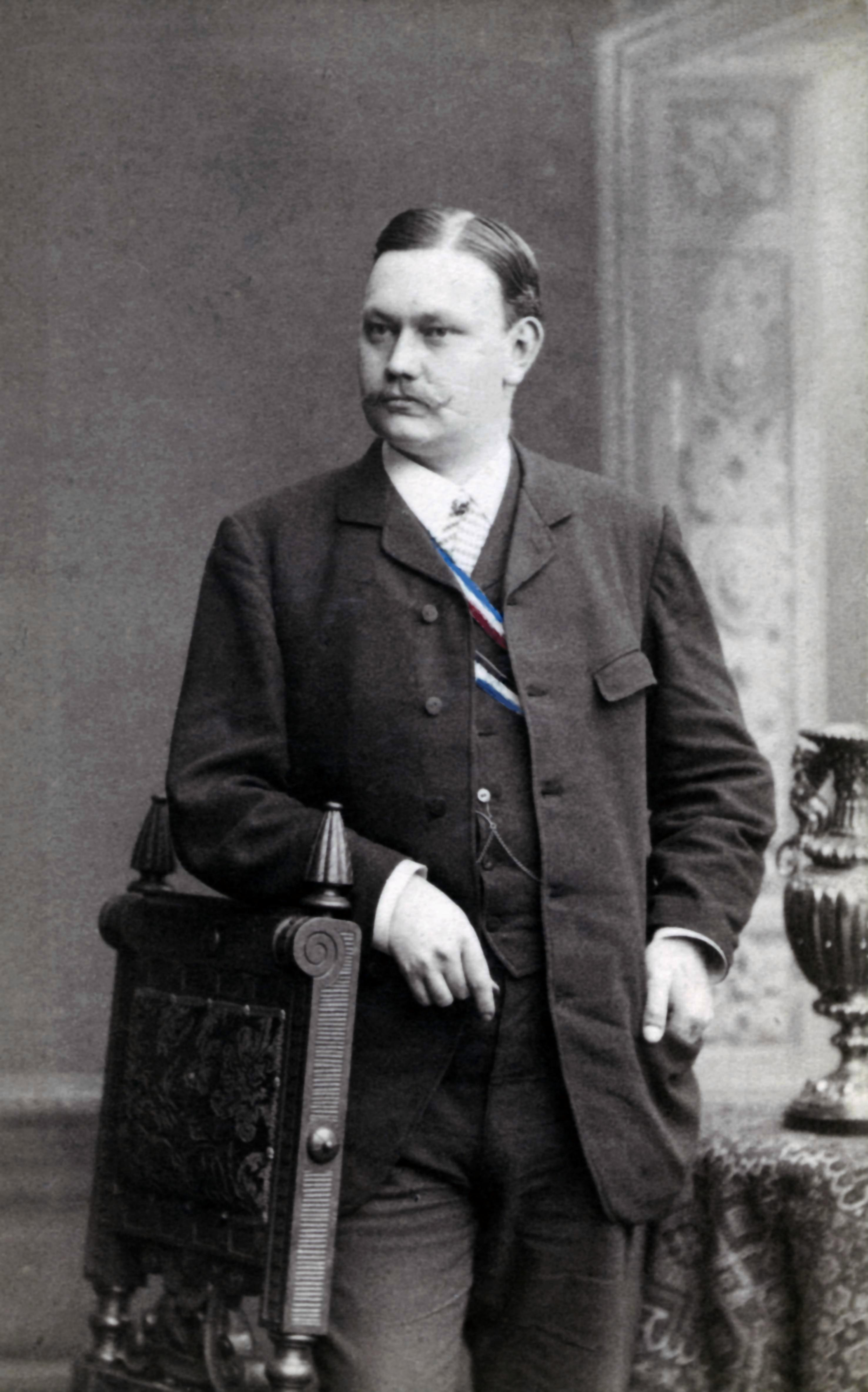 Porträtfotografie von Johann Stobbe